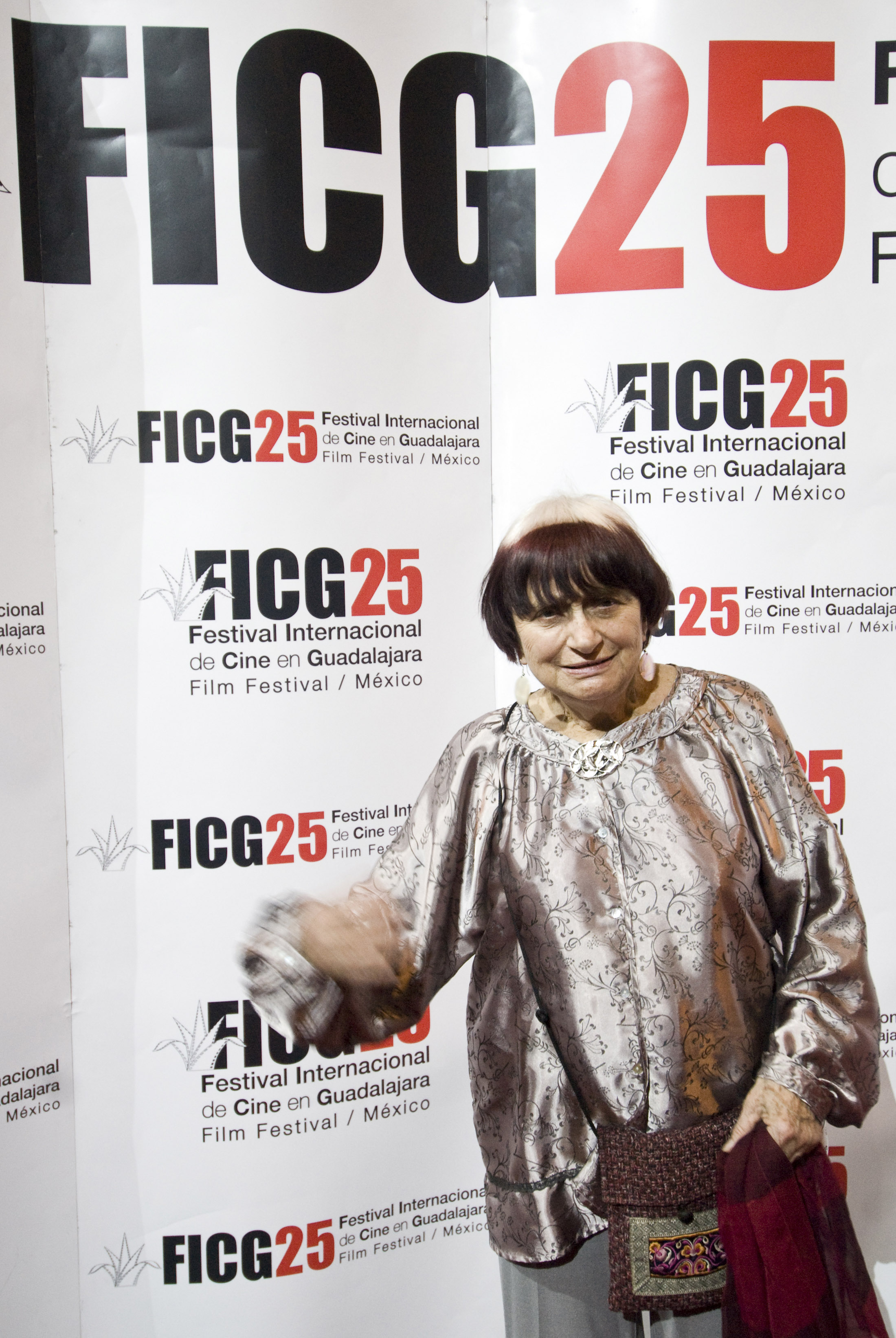 Agnés Vardá, directora francesa, llega a la alfombra roja de la gala del filme "Yo también", de Álvaro Pastor y Antonio Naharro, en donde se le entrega el Mayahuel de Plata, en el marco del Festival Internacional de Cine de Guadalajara en su edición 25. 18 de Marzo, 2010. Guadalajara, México. © Cortesía FICG25 / Michel Amado Carpio.